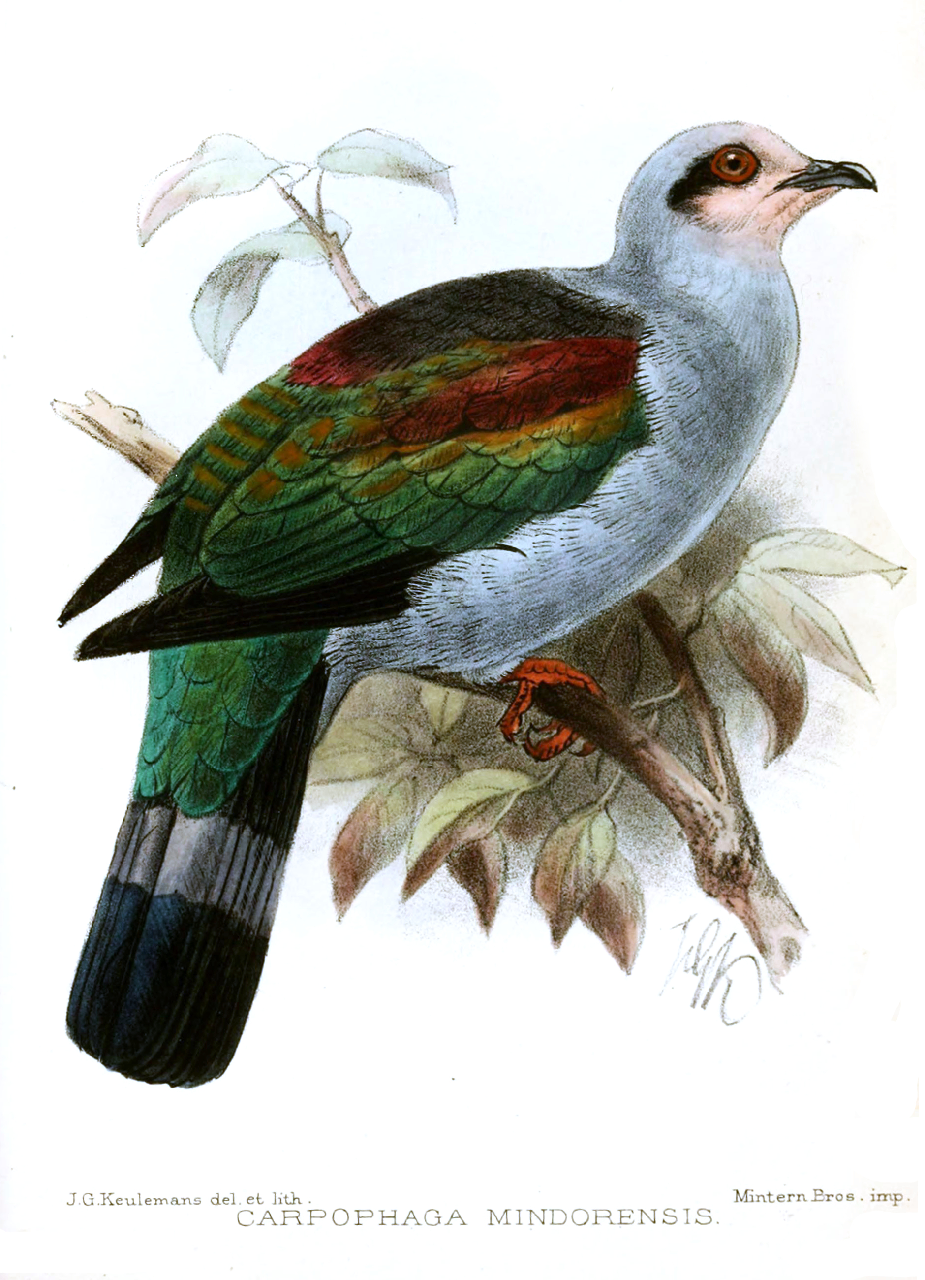 Carpophaga mindorensis = Ducula mindorensis